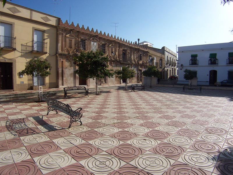 Plaza de típica de Aceuchal